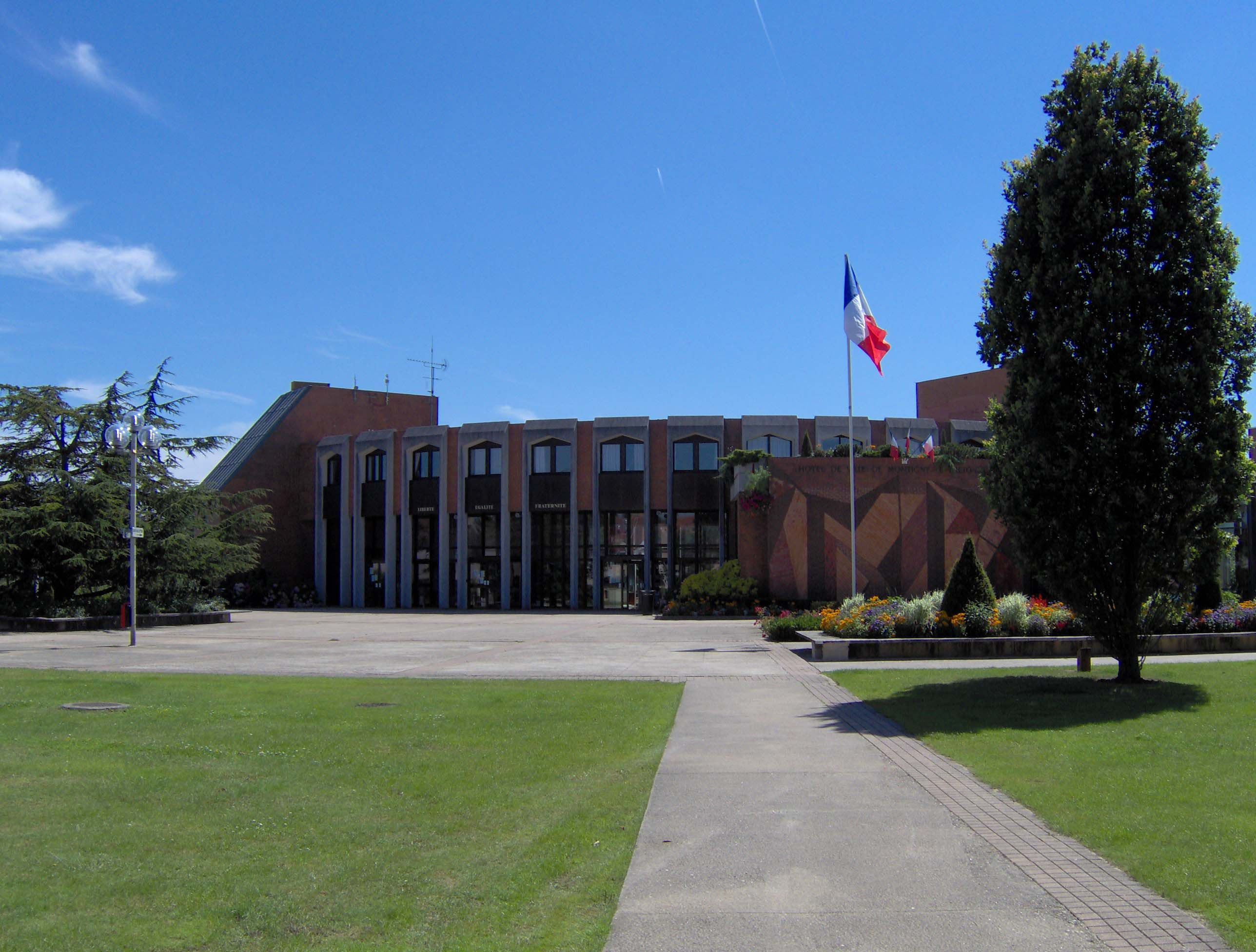 Mairie de Montigny-le-Bretonneux.